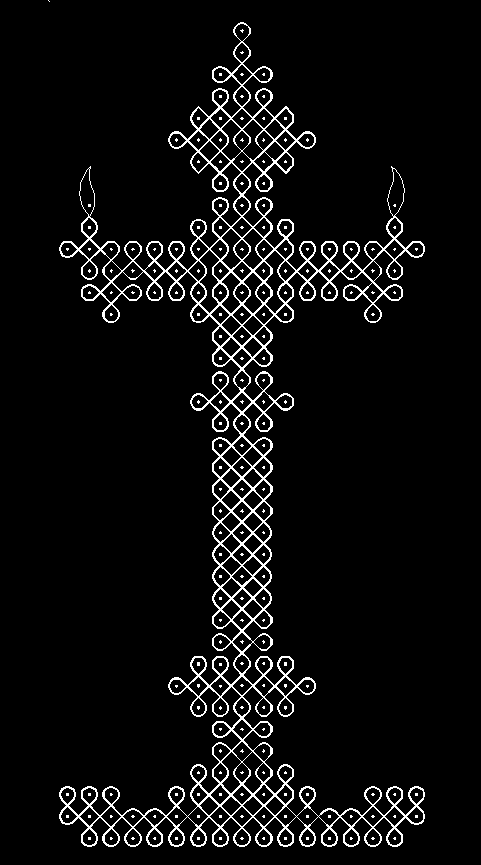 Kuththu Vilakku